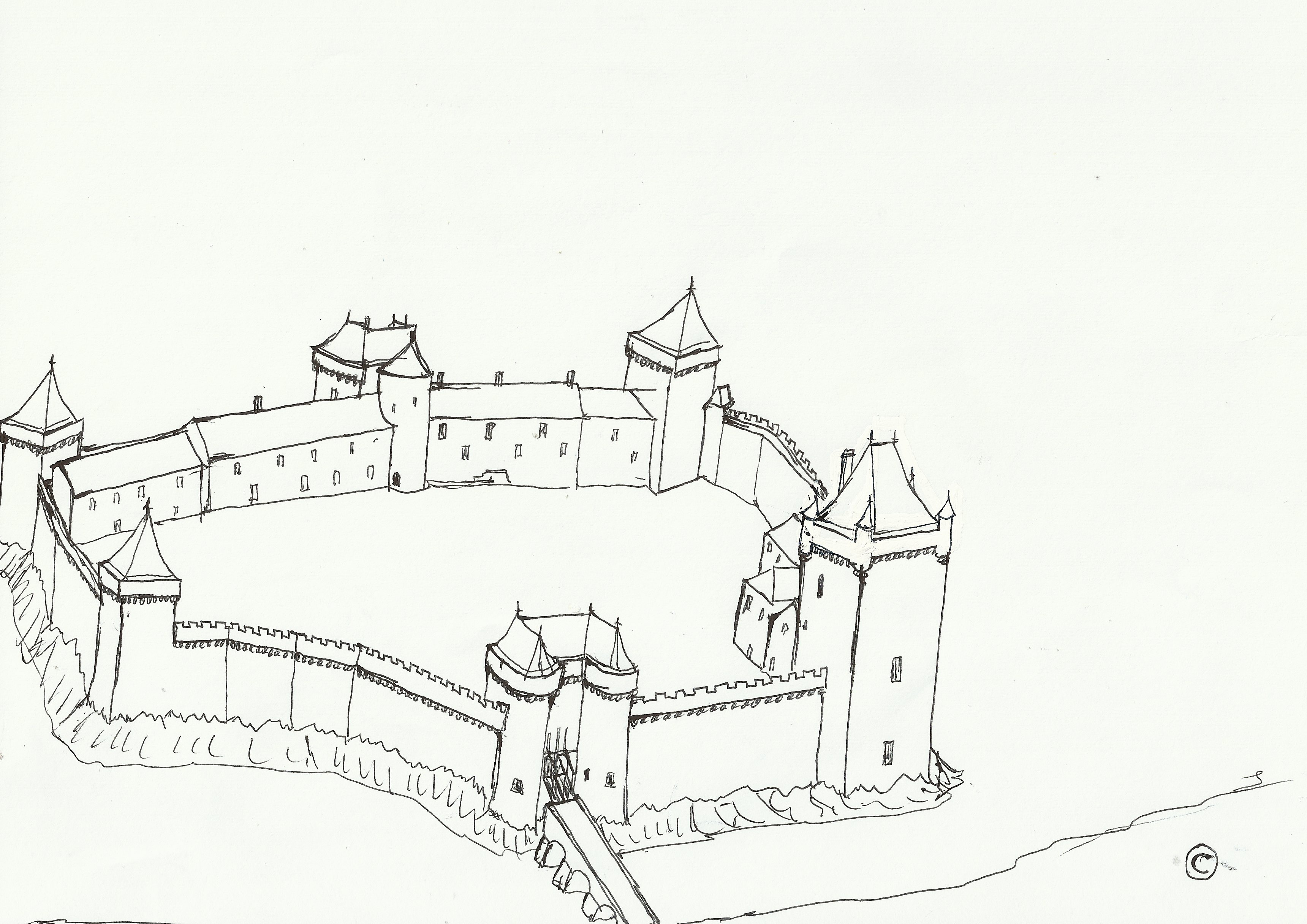 Essai de reconstitution du château fort des Essarts sous forme de croquis.